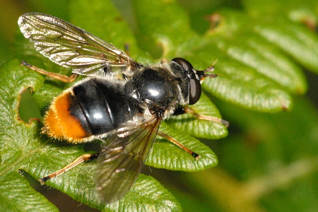 Blera fallax from Commanster, Belgian High Ardennes .